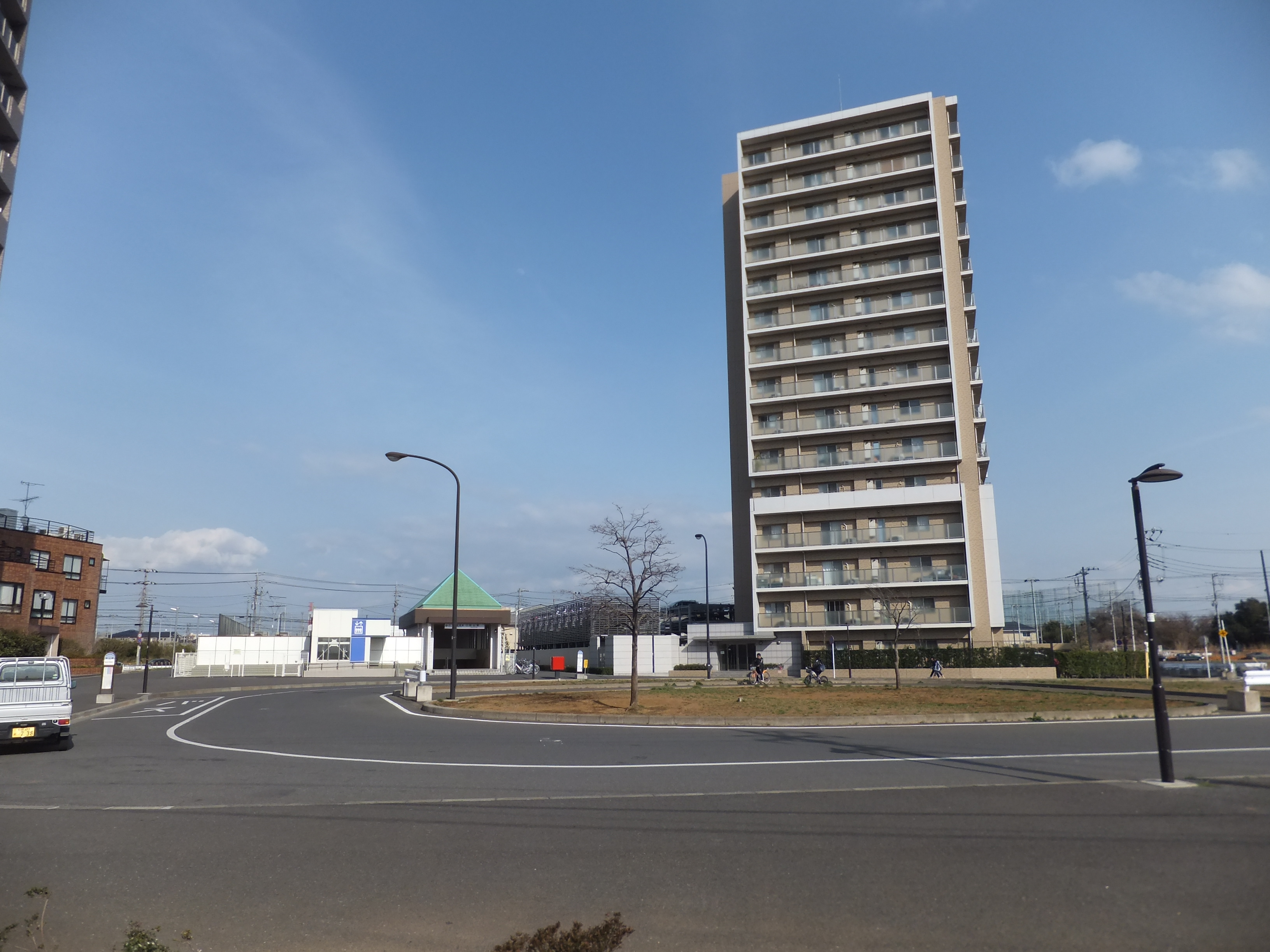 北総鉄道秋山駅前ロータリー